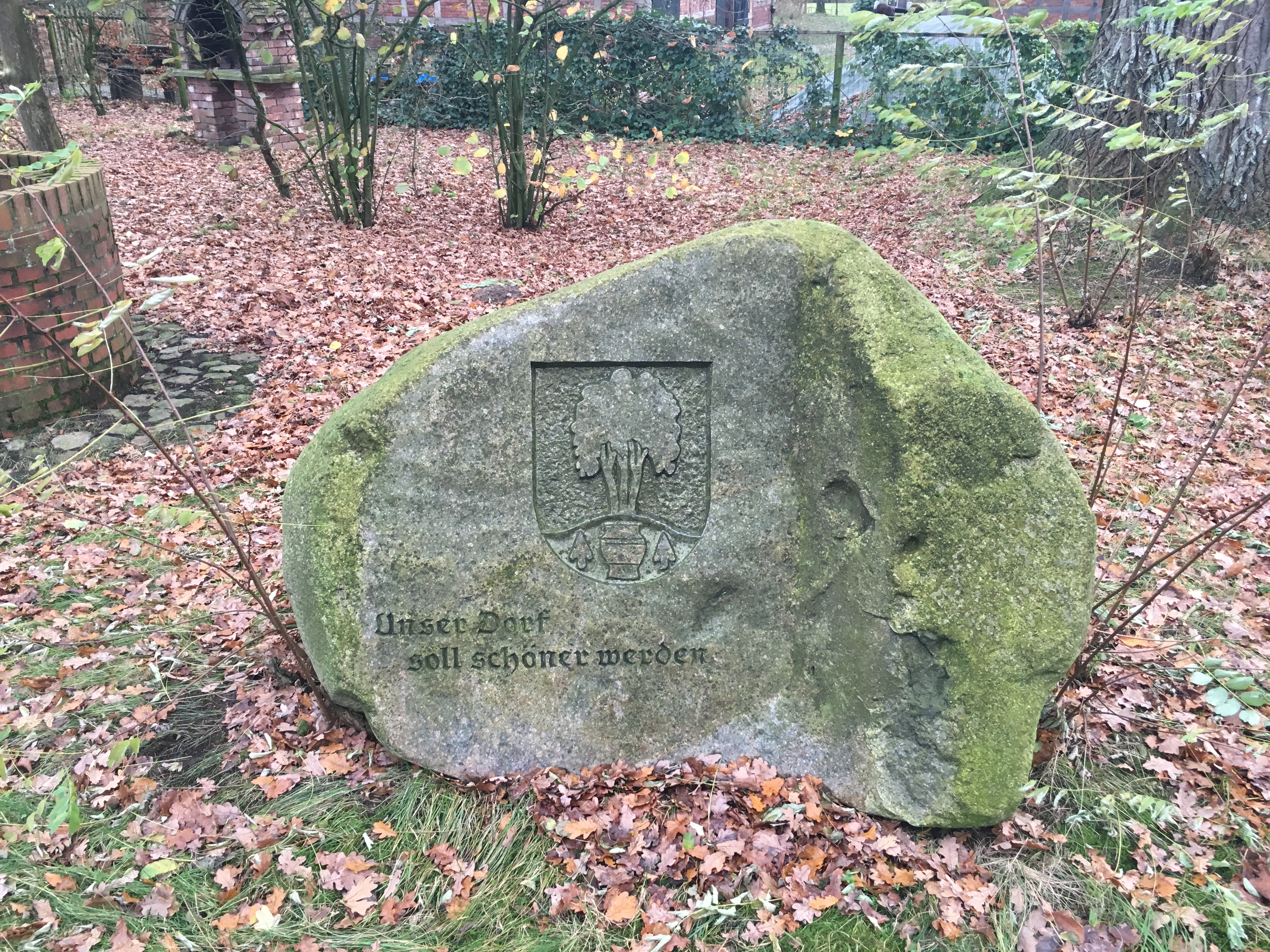 Gedenksteen Uns Dörp schall schöner warrn in Barchel